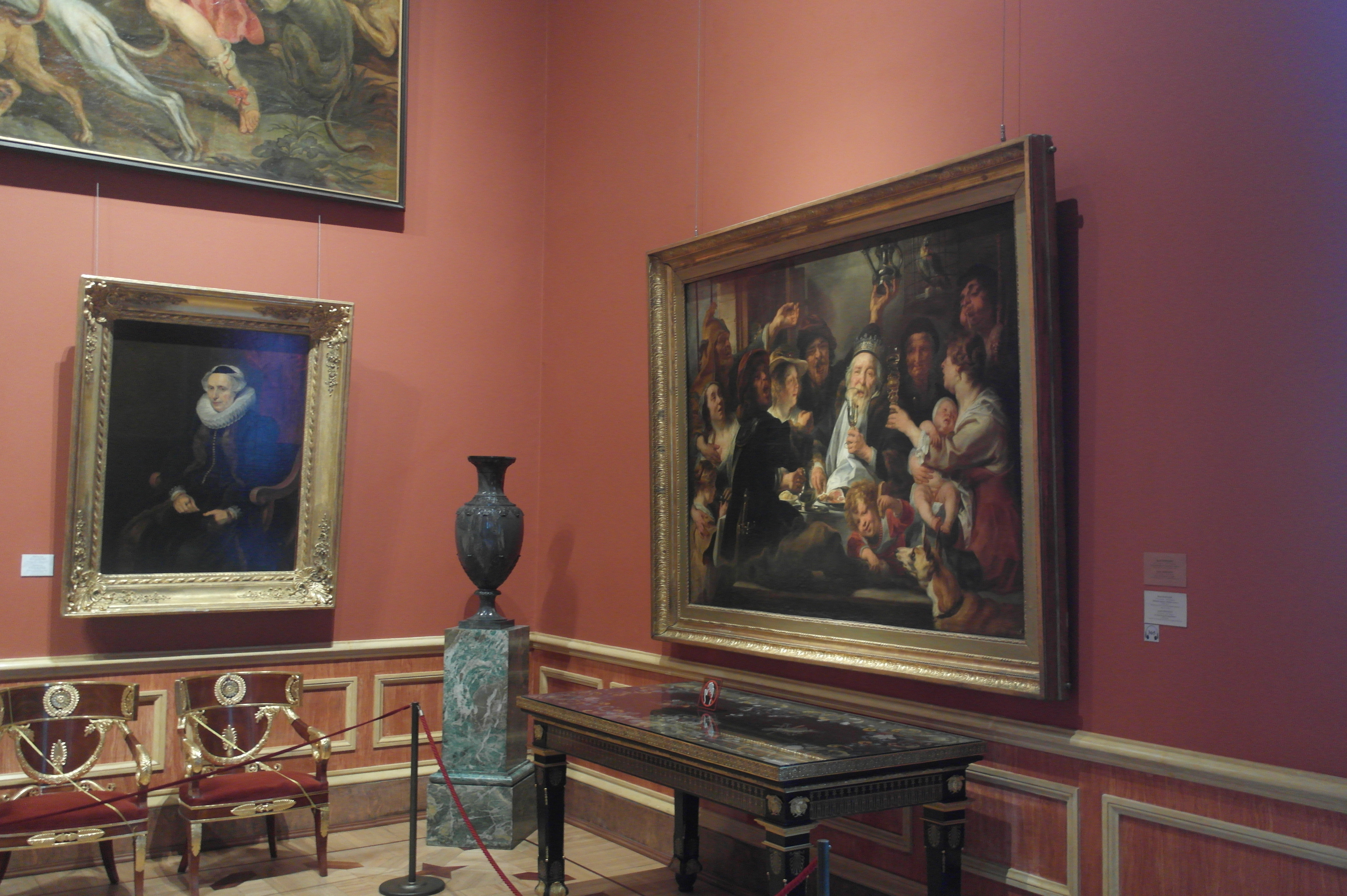 Новый Эрмитаж, зал 248